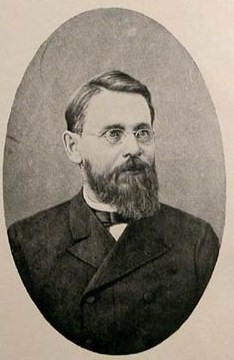 Богородицкий В.А. Введение в татарское языкознание в связи с другими тюркскими языками. Казань: Таткнигоиздат. 1953